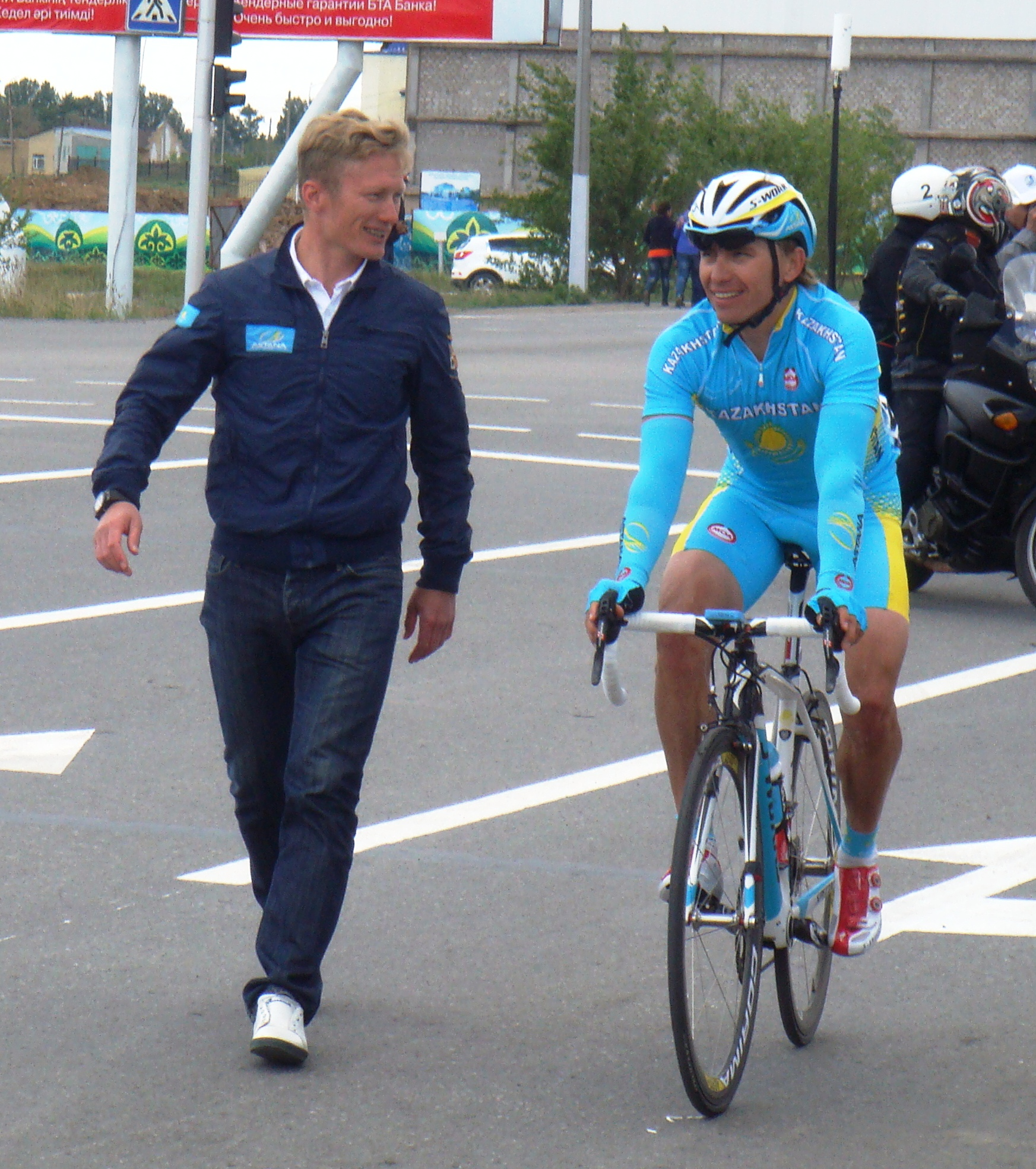 Чемпионат Азии по велоспорту 2014